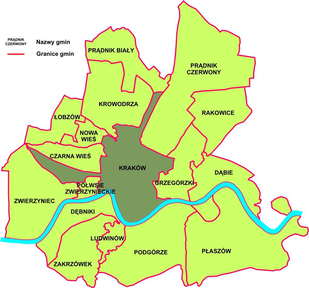 Granice administracyjne Krakowa i ówczesnych gmin okalających miasto w 1900 roku